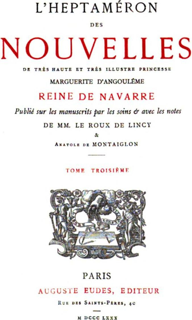 L'Heptaméron des nouvelles de très haute et très illustre princesse Marguerite d'Angoulême, Reine de Navarre, (Le Roux de Lincy, Anatole de Montaiglon, Ed.), Tome troisième, Paris, Augustin Eudes, M CCC LXXX